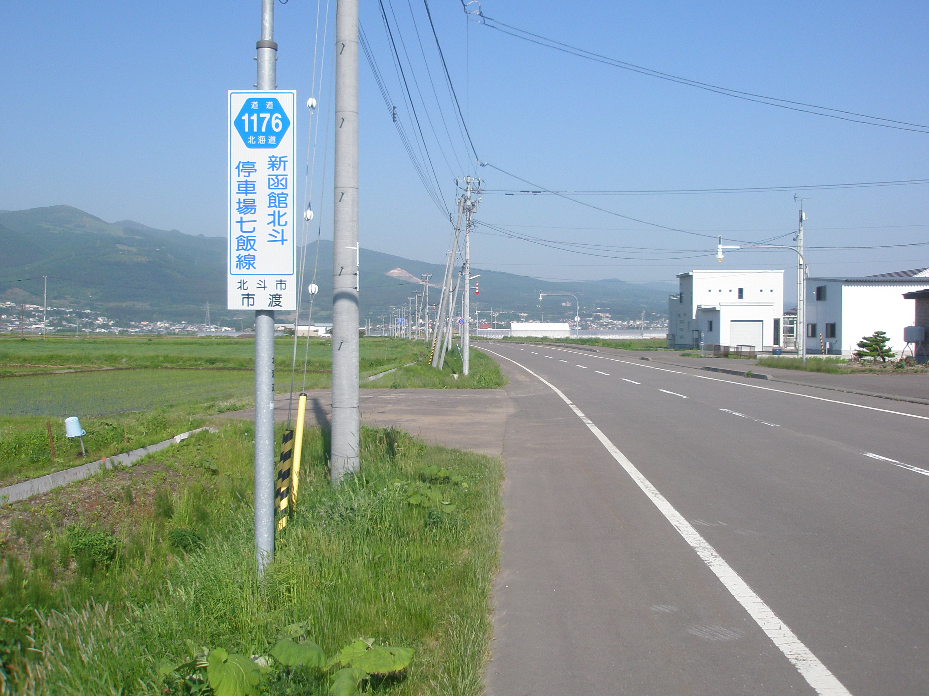 北海道道1176号新函館北斗停車場七飯線・道道番号及び路線名標識-2